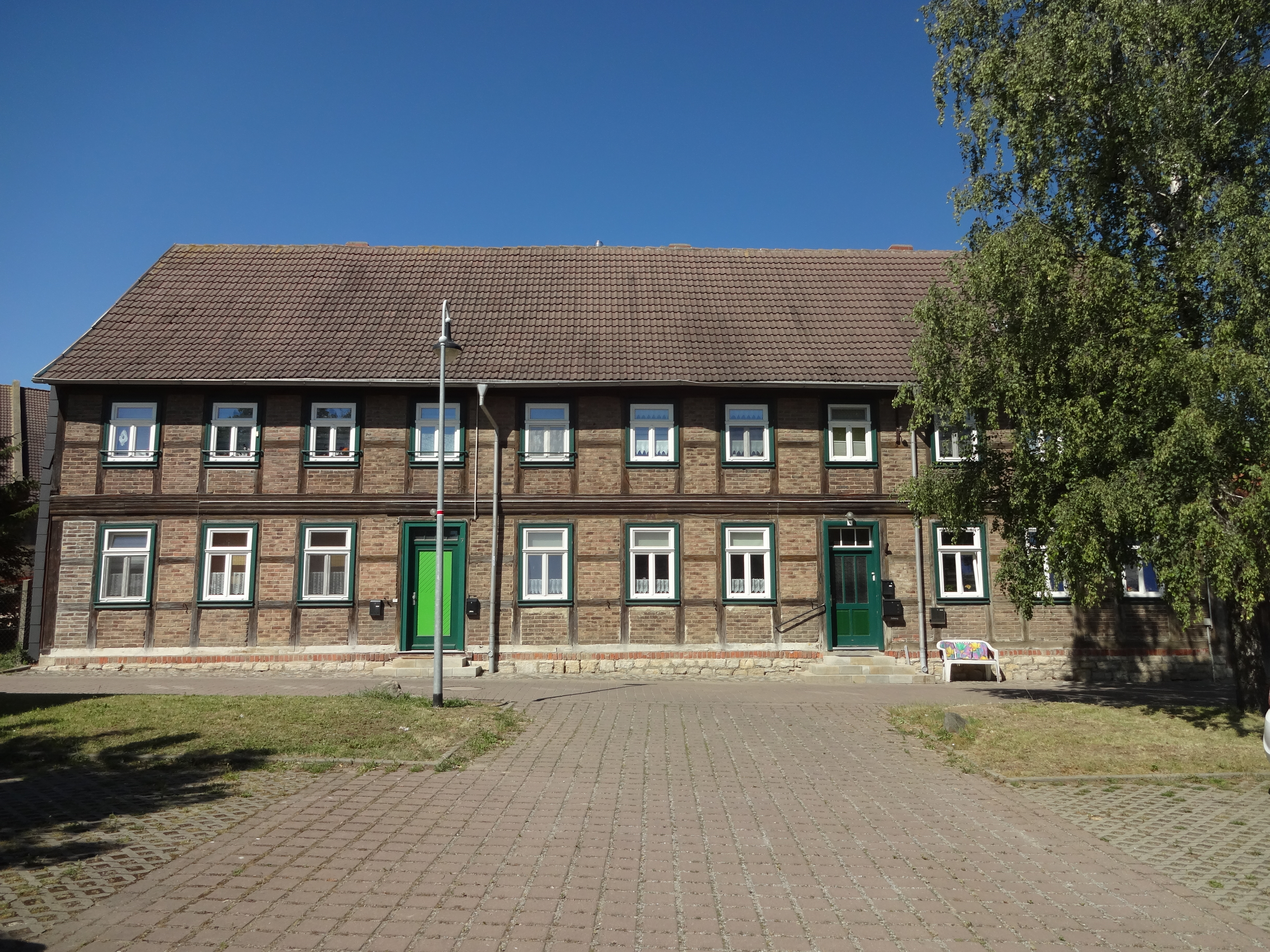 denkmalgeschütztes Wohnhaus in der Faktoreistraße 7, 8 in Langeln, Gemeinde Nordharz